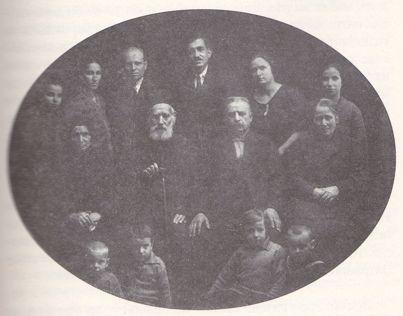 bulgarian revolutionaries